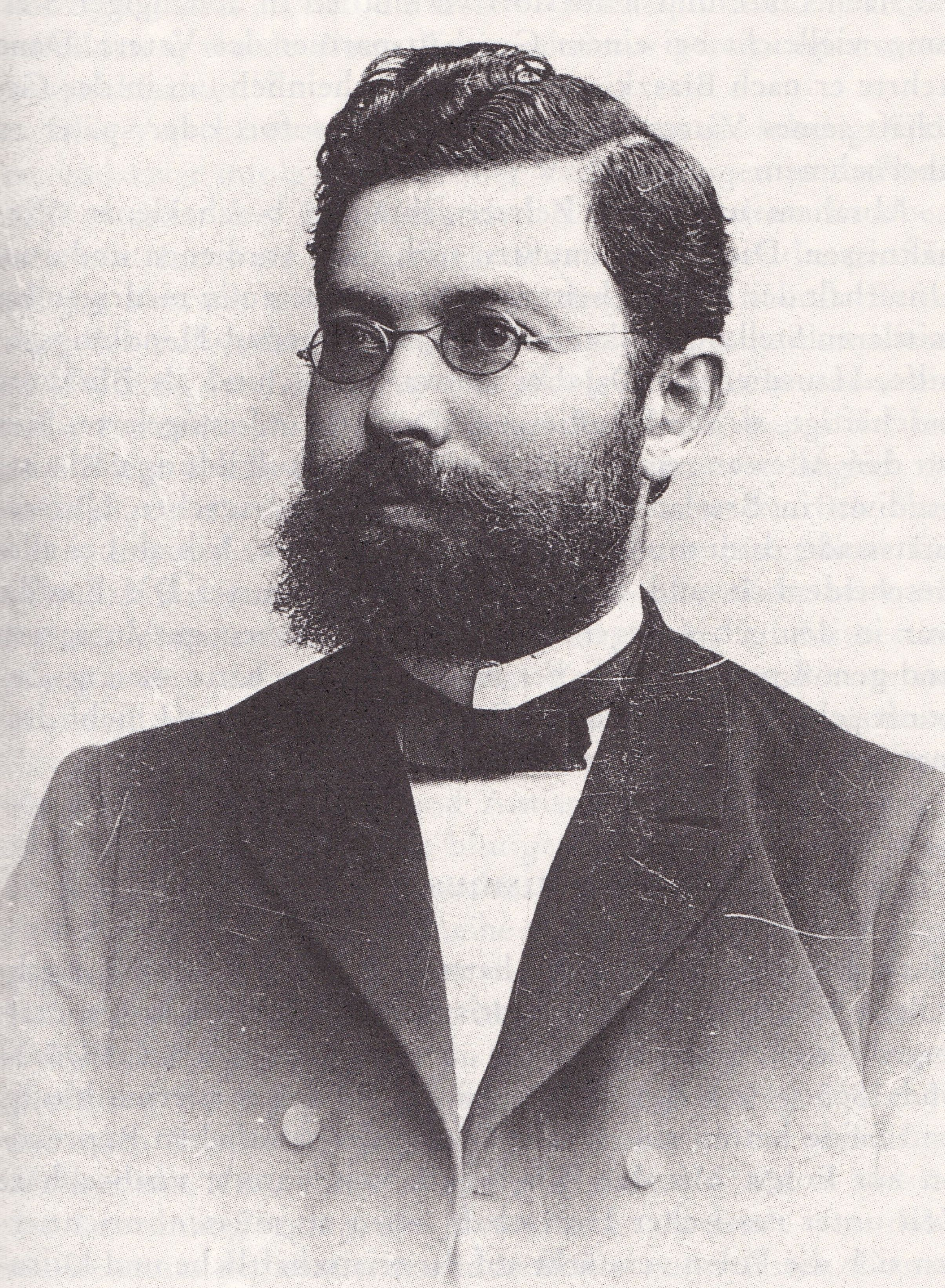 Das Bild zeigt den Großherzoglichen Landesrabbiner von Darmstadt, vermutlich um das Jahr 1890 herum.